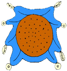 Glifo o escudo de armas del municipio de Tlanalapa.